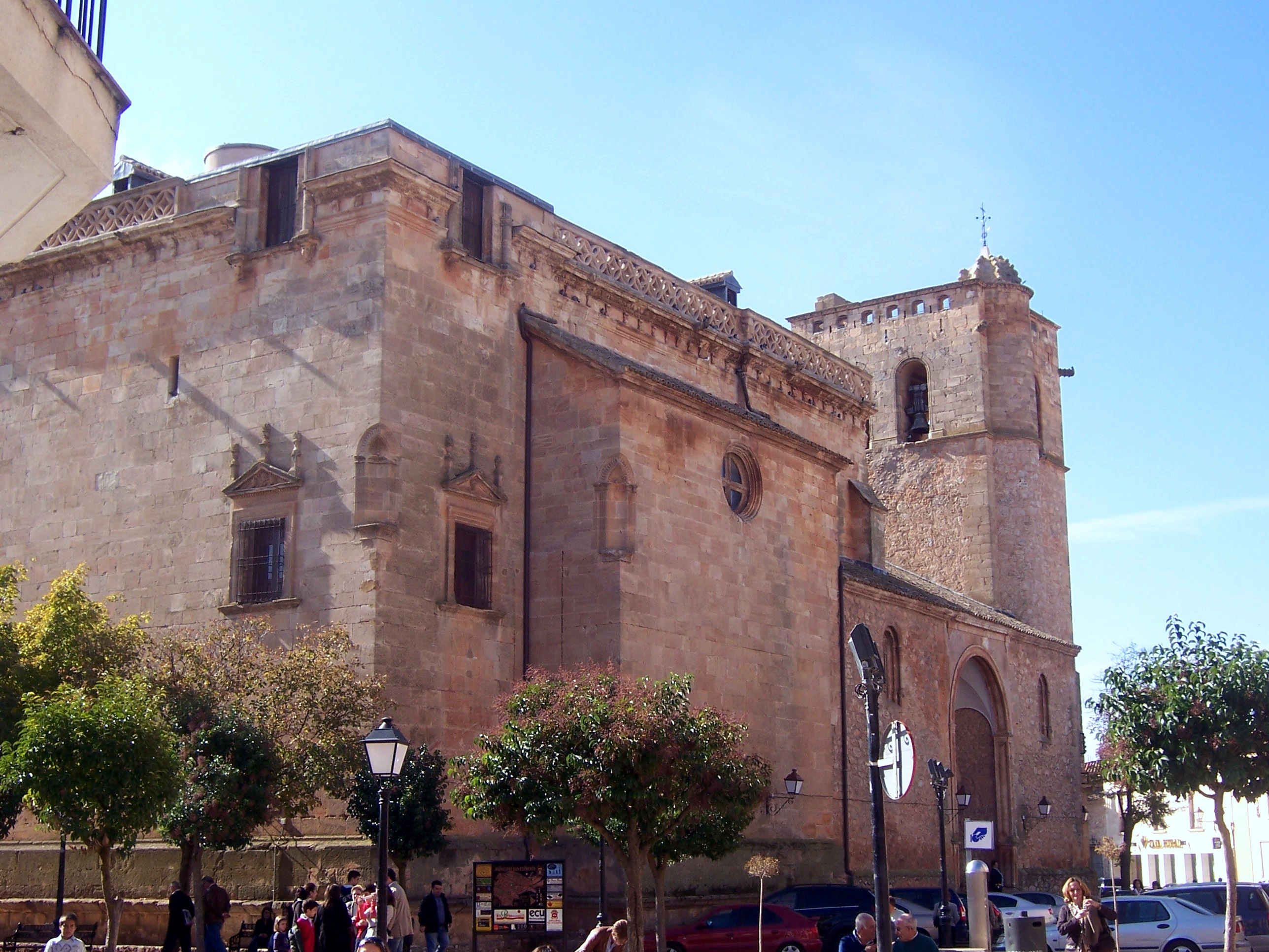 Fachada Norte de la Parroquia de Santiago Apostol de San Clemente, tomada desde el noreste.